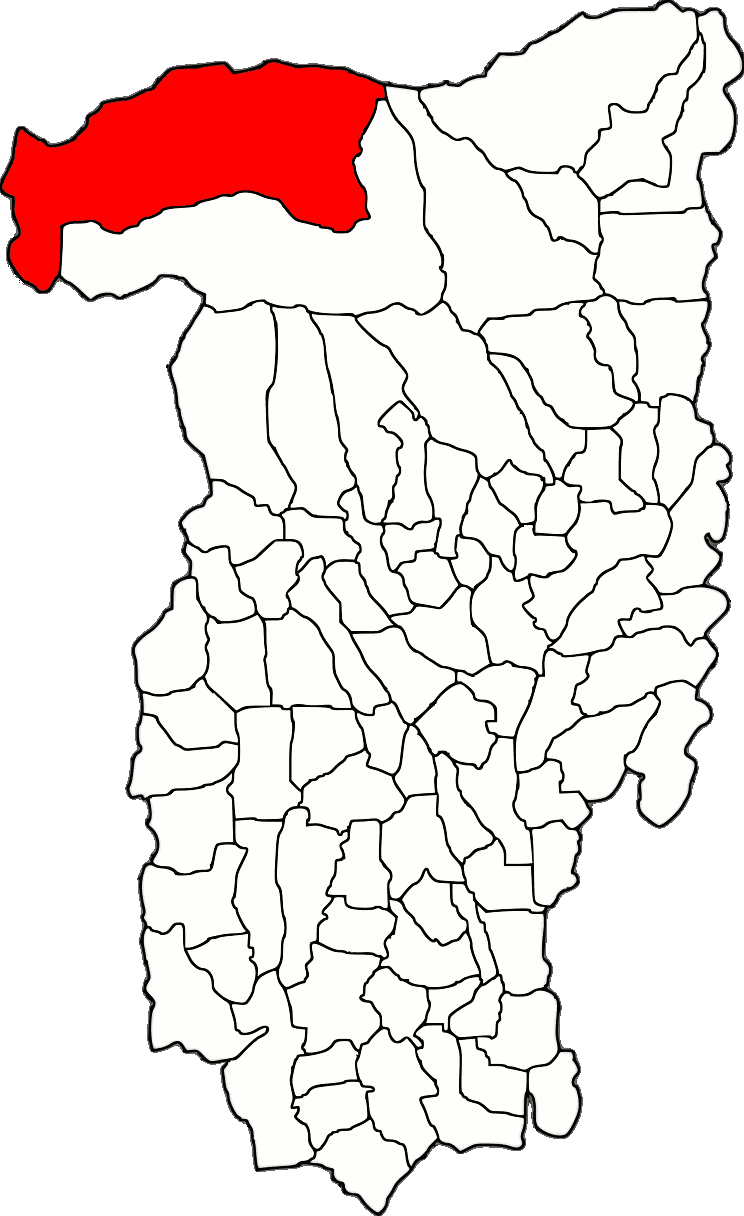 Lage der Gemeinde Voineasa im Kreis Vâlcea (RO).